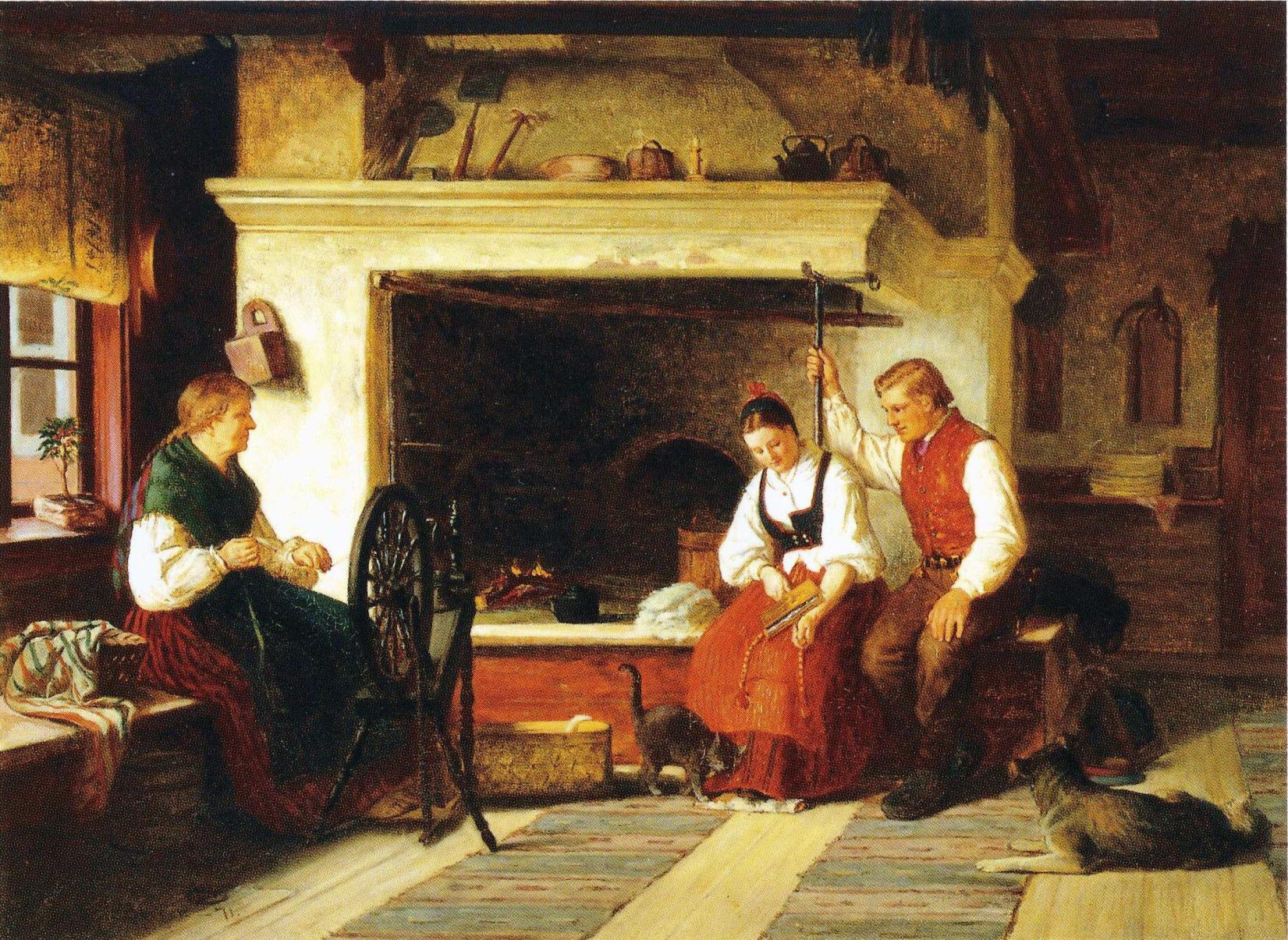 Adolf von Beckerin maalaus Pohjalainen kosintakohtaus. Maalaus on sijoitettu Presidentinlinnaan Helsingissä.